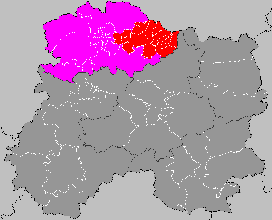 Localisation du canton de Beine-Nauroy